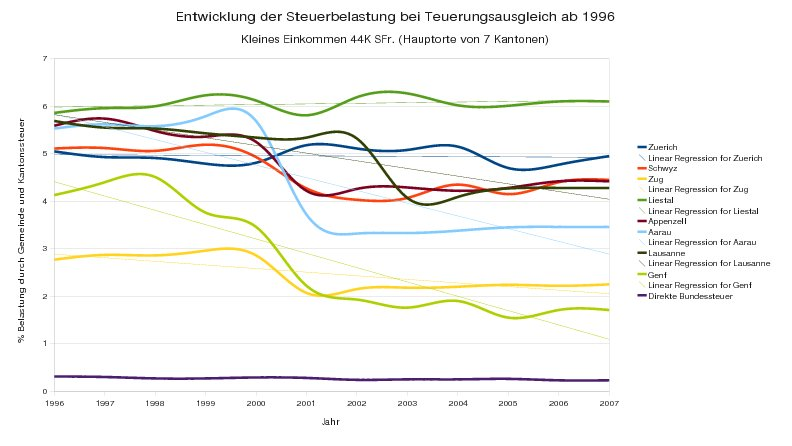 Visualisierung: Entwicklung der Steuerbelastung bei Teuerungsausgleich ab 1996 Belastung des Bruttoarbeitseinkommens durch Kantons-, Gemeinde- und Kirchensteuern für einen Verheirateten, unselbständig Erwerbenden mit Lohnausweis, ohne Kinder in der Schweiz. Basierend auf [1]